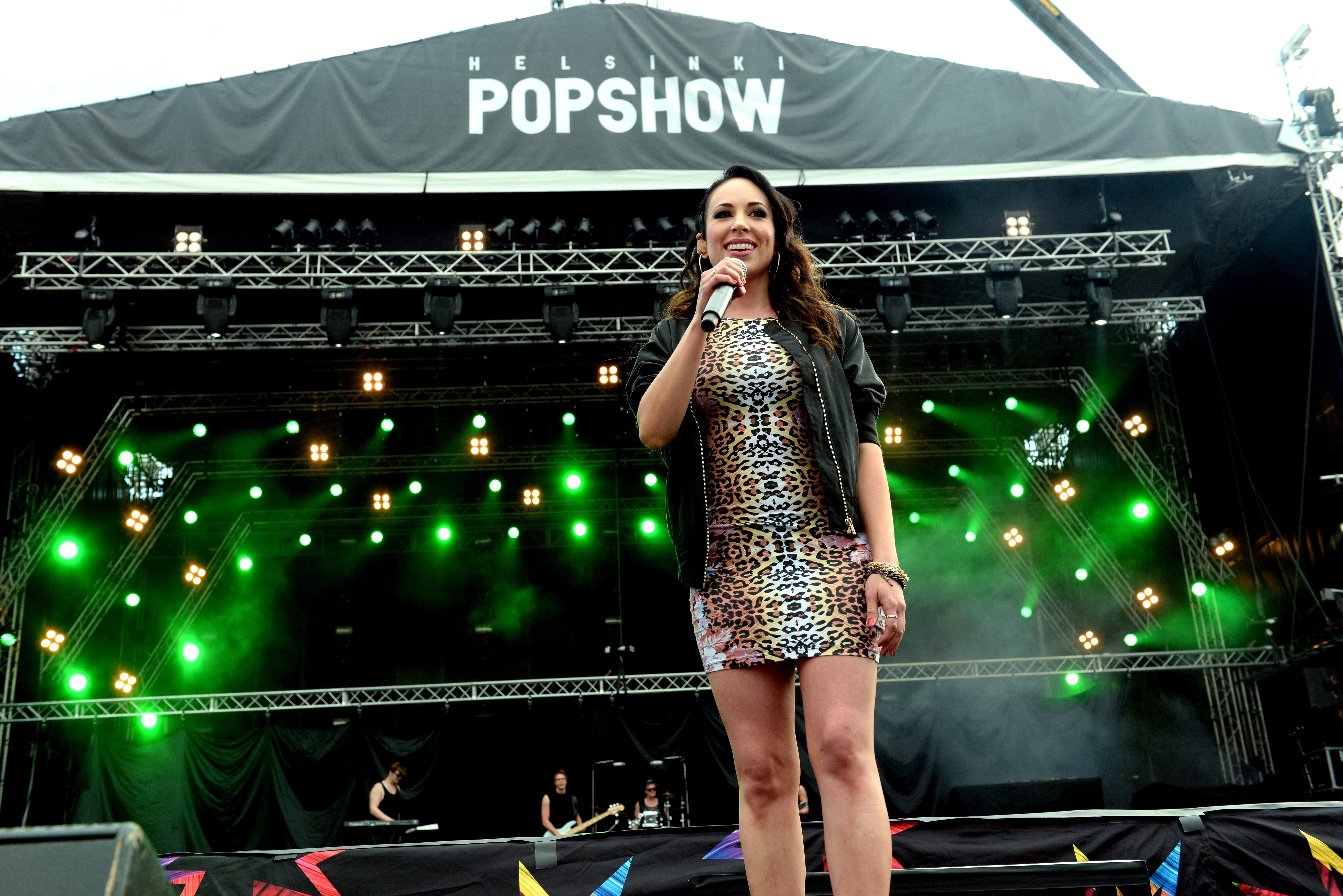 Janna Helsinki Pop Showssa 2014